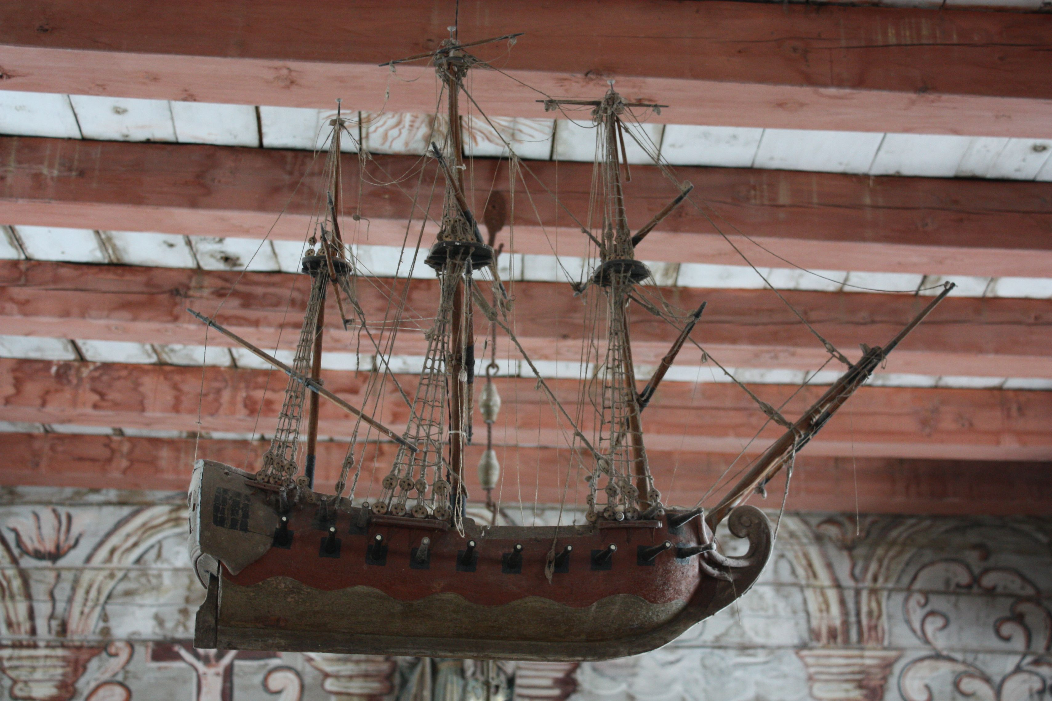 Bilde av skipet i taket i Holdhus Kirke